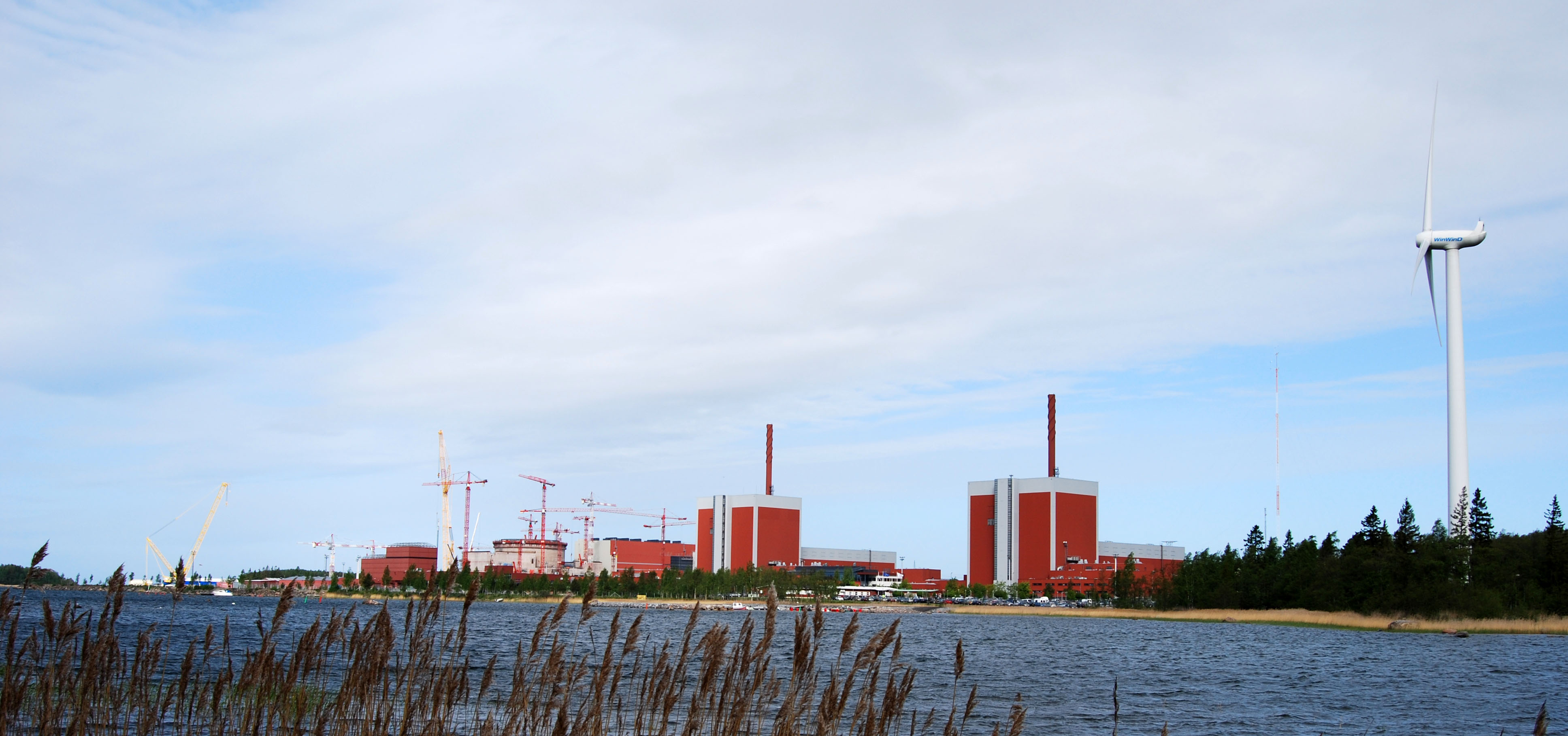 Olkiluodon kaksi ydinvoimalaa, tuulivoimala ja rakenteilla oleva kolmas reaktori.